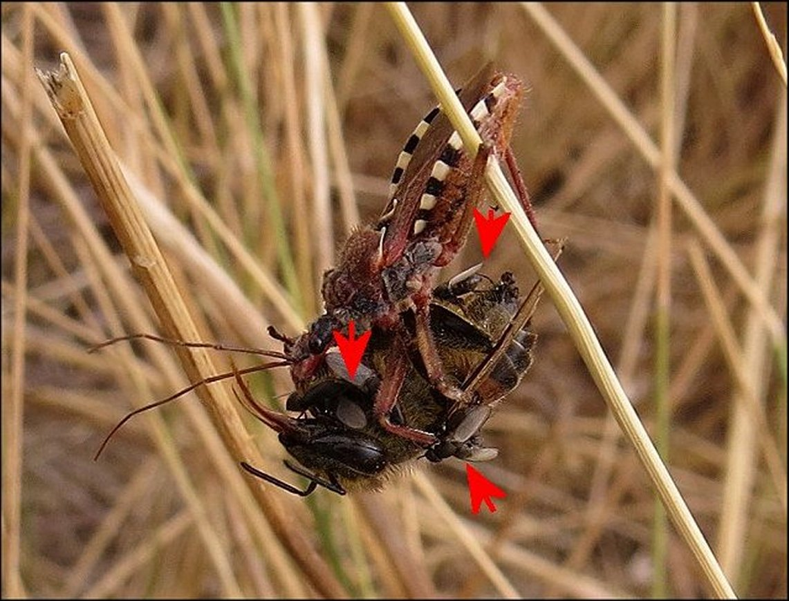 Réduve Rhynocoris erythropus se nourrissant d'une Abeille qui attire des Milichiidae